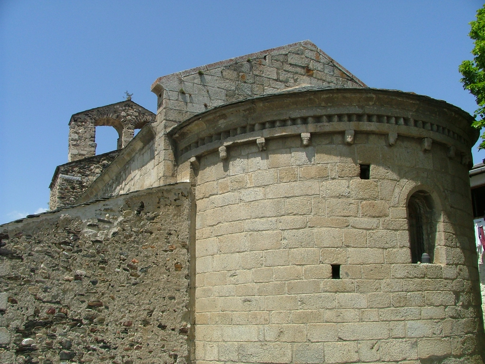 Sant Julià d'Estavar